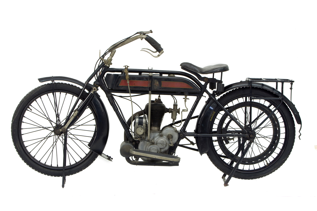 Motocicletta con telaio tubolare, parafanghi e serbatoio verniciati di nero brillante. Nella parte centrale è collocato il motore monocilindrico verticale, a quattro tempi, con valvole laterali registrate. Al di sopra del motore è sistemato il serbatoio, con strisce rosse sui lati; al di sopra del serbatoio si trova la leva del cambio, mentre sul lato destro è posta la pompa a mano per la lubrificazione. Ai lati del motore sono sistemate due pedane poggiapiedi. La trasmissione è a cinghia. La ruota anteriore è imperniata su una forcella elastica, dotata di molle racchiuse in astucci telescopici. I freni sono montati sulla puleggia della cinghia posta sulla ruota posteriore. Entrambe le ruote sono dotate di cavalletto. Notizie storico-critiche Questa motocicletta deriva dalla rielaborazione di una precedente versione militare introdotta nel 1912 e rimase sul mercato dal 1915 al 1923.